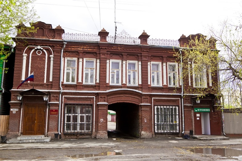 Kurgan.Pro